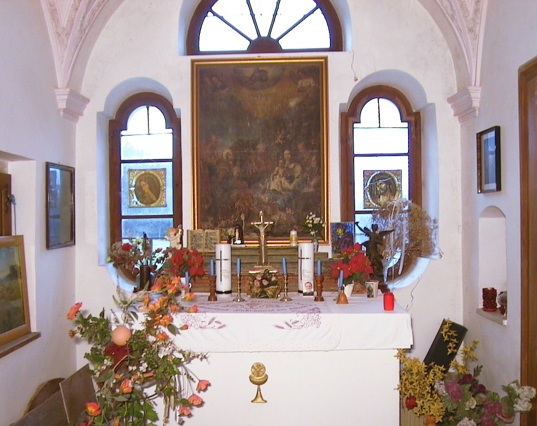 Kapelle in Schloss Hackledt, Gemeinde Eggerding, Bezirk Schärding, Oberöstereich. Zur Geschichte der Anlage und ihrer Besitzer siehe SEDDON Christopher R., Adelige Lebenswege zwischen Bayern und Österreich. Herrschaftsformen und Herrschaftsstrukturen des Landadels am unteren Inn in der Frühen Neuzeit, dargestellt am Beispiel der Herren und Freiherren von Hackledt, Wien (Diss.) 2009, S. 1160–1186 (detaillierte Besitzgeschichte von Schloss Hackledt).